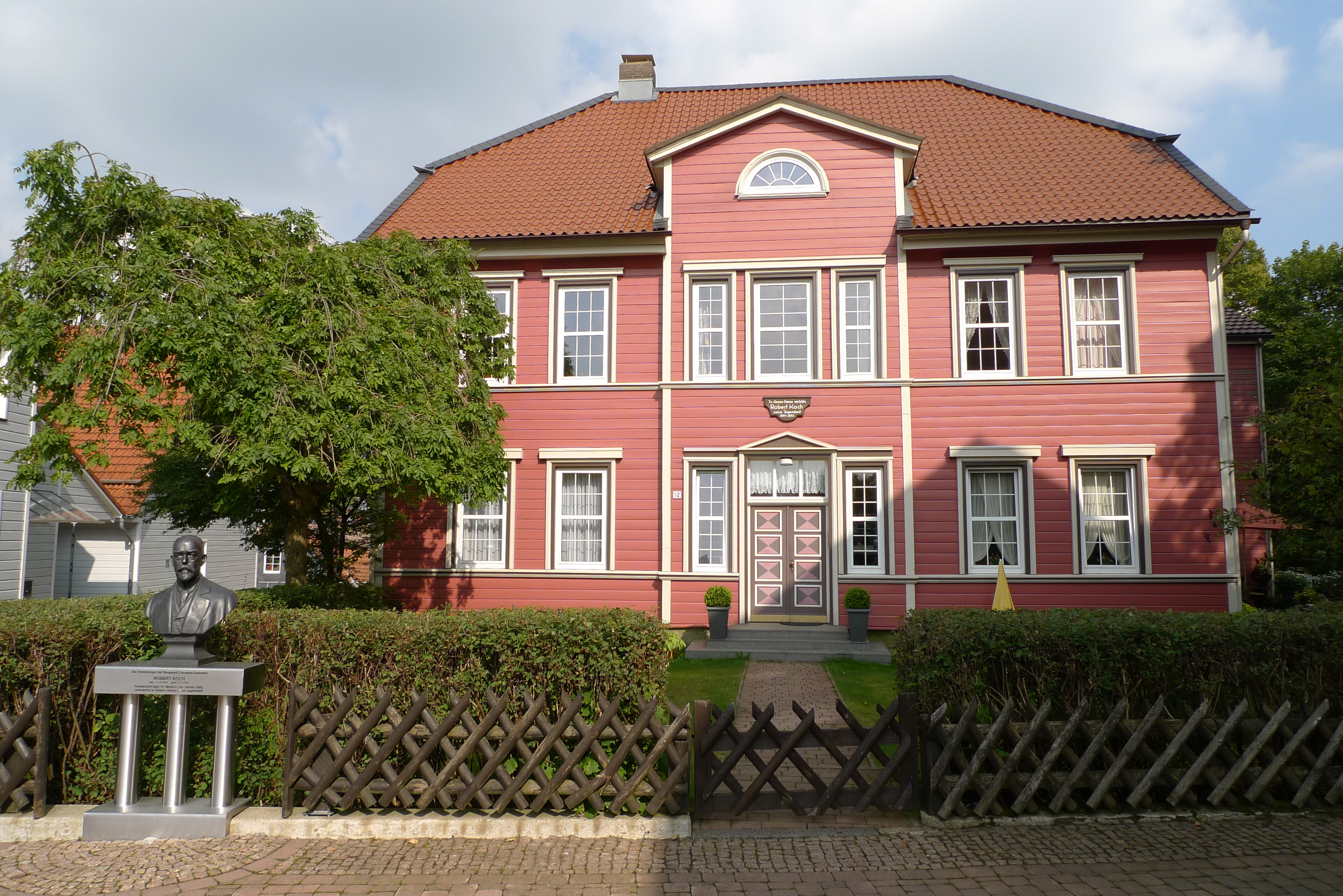 Jugendhaus von Robert Koch am Kronenplatz in Clausthal